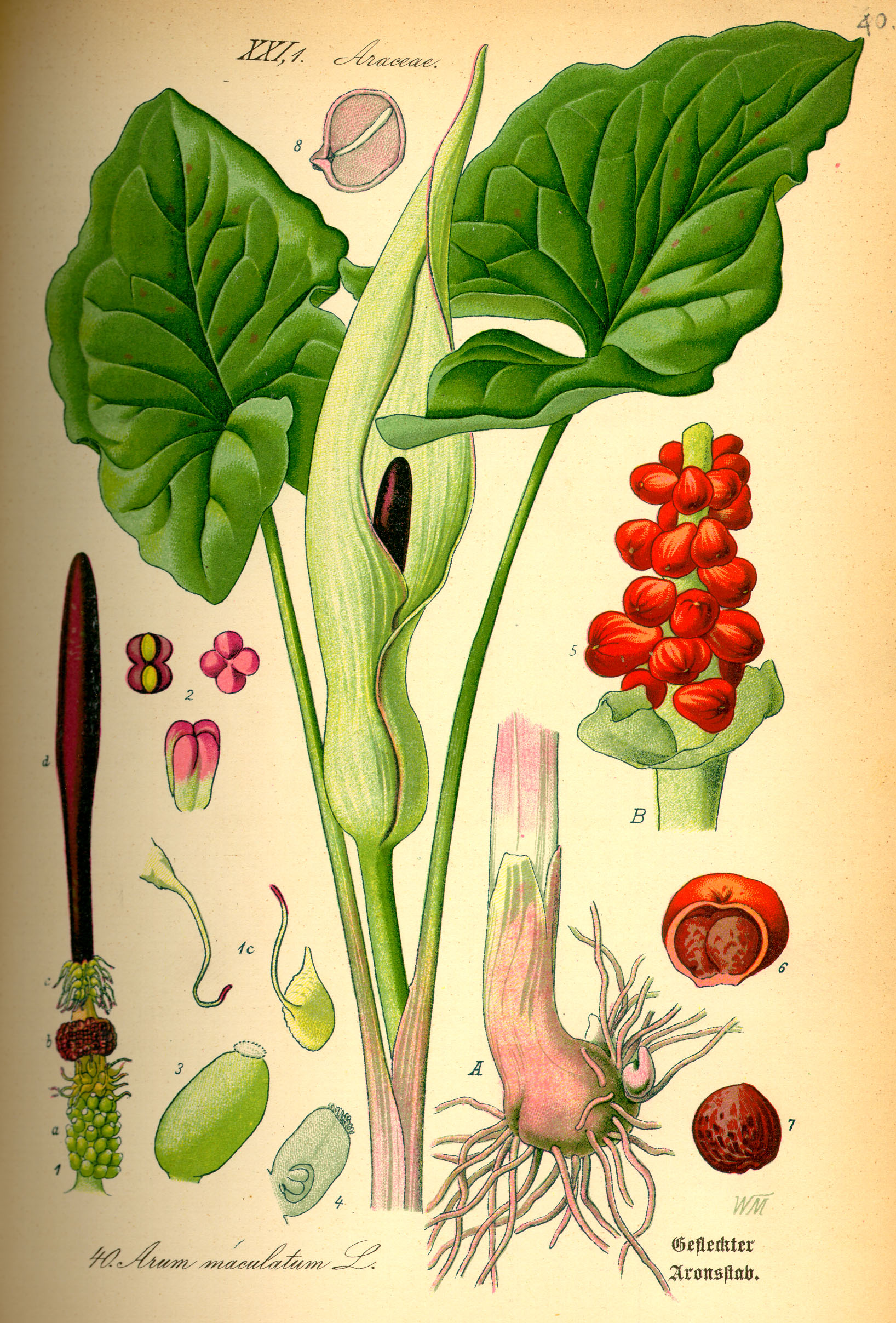 Name Arum maculatum Family Araceae